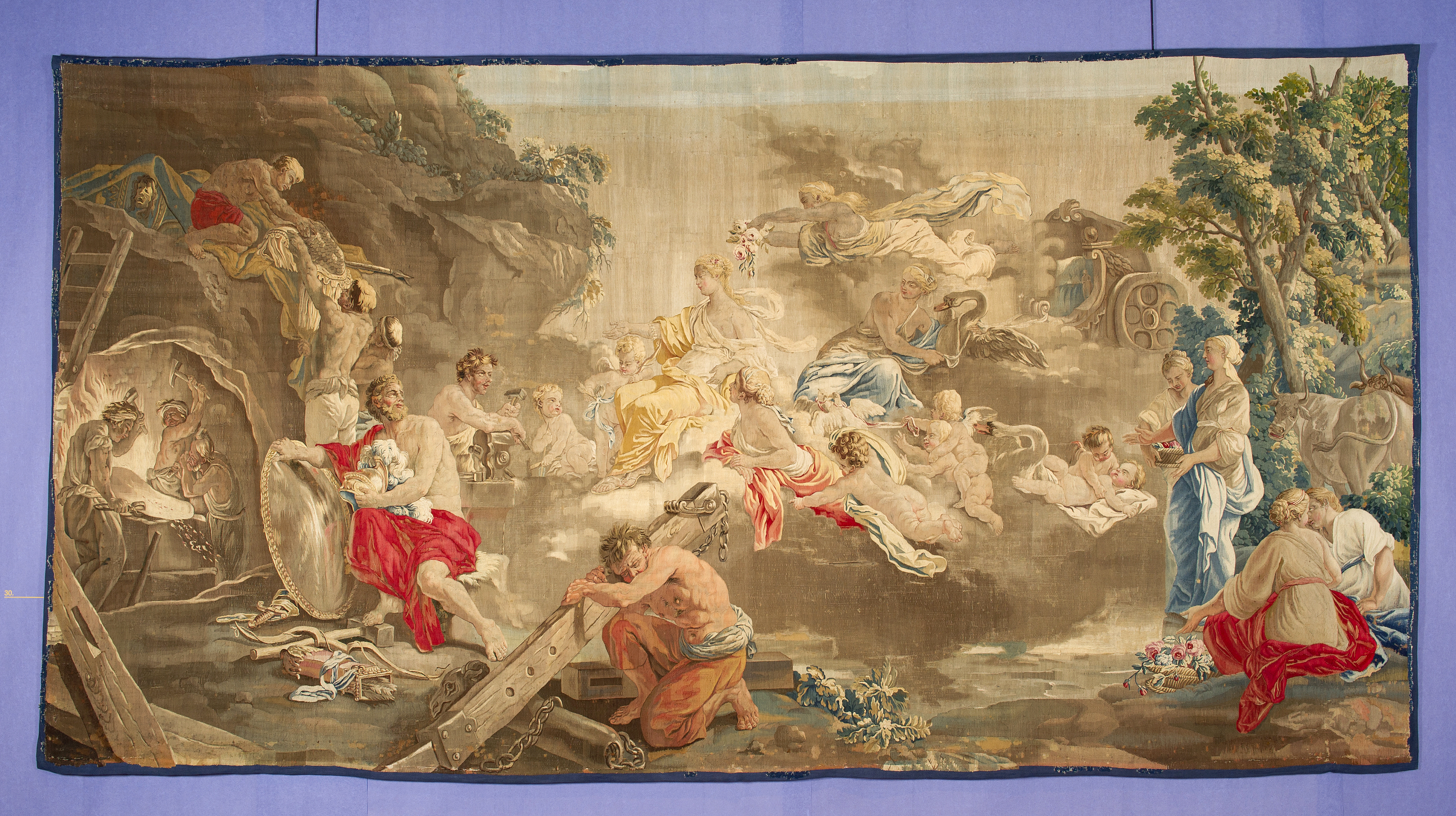 Tapisserie de Louis Lagrenée (1724-1805), tapisserie de basse lisse, laine et soie, vers 1760, 3 x 5,90 m. Collection du musée d'Aubusson, acquisition 2012 avec l'aide du FRAM Limousin